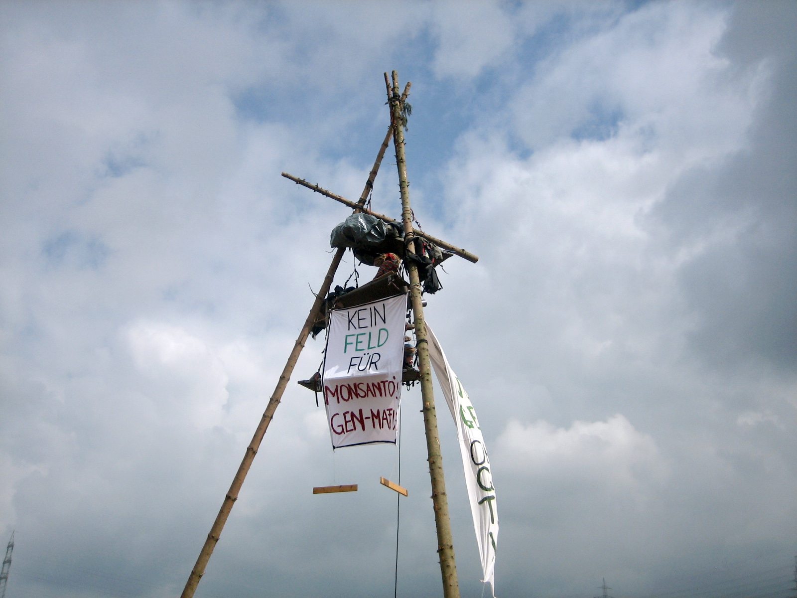 Tripod bei einer Aktion gegen Gentechnik in Oberboihingen